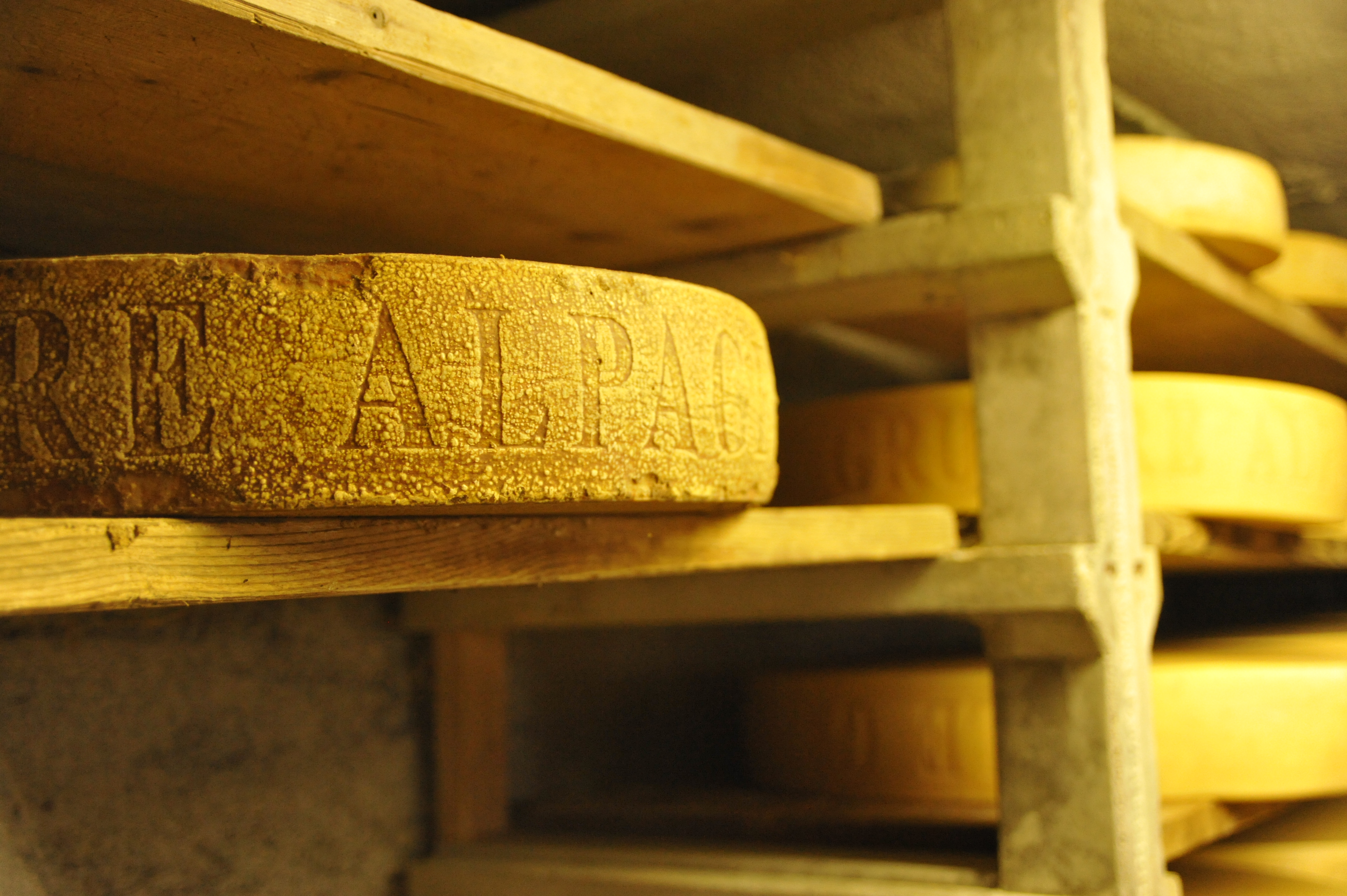 Vieux fromageau-dela de quinze mois, où?